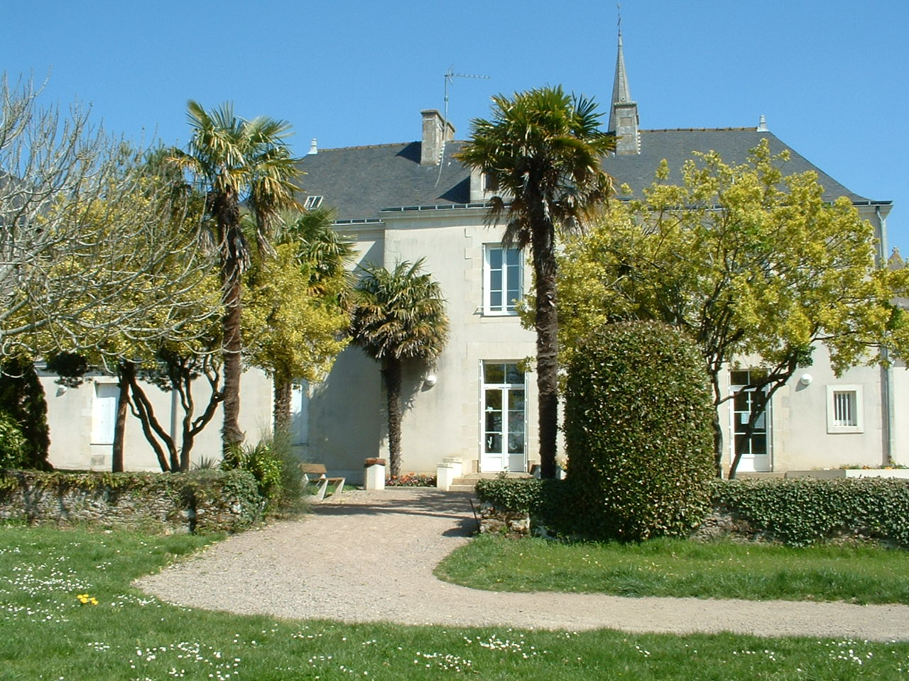 Chauvé (France) - Bibliothèque